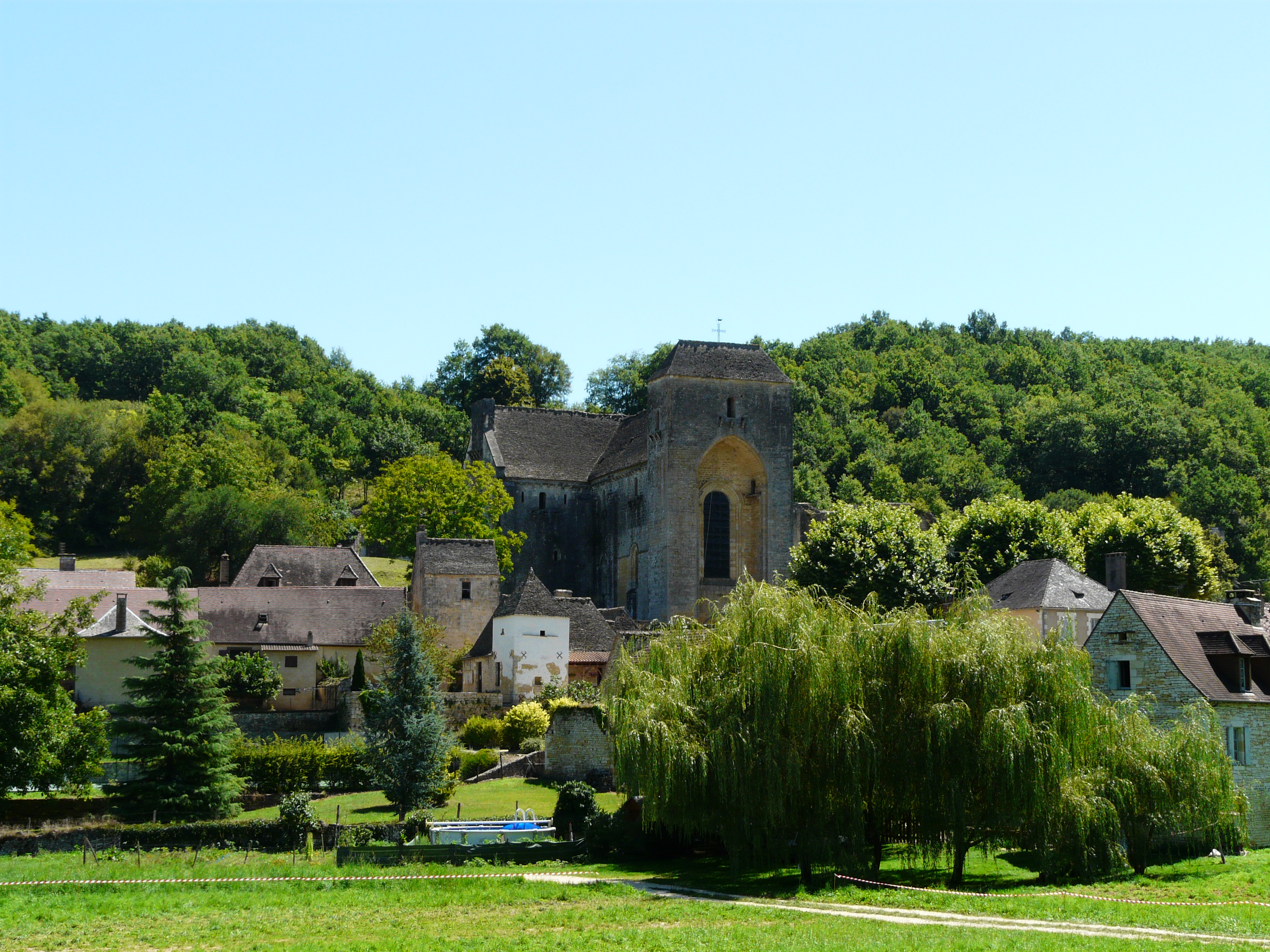 Dominé par l'imposante masse de son église, le village de Saint-Amand-de-Coly, Dordogne, France